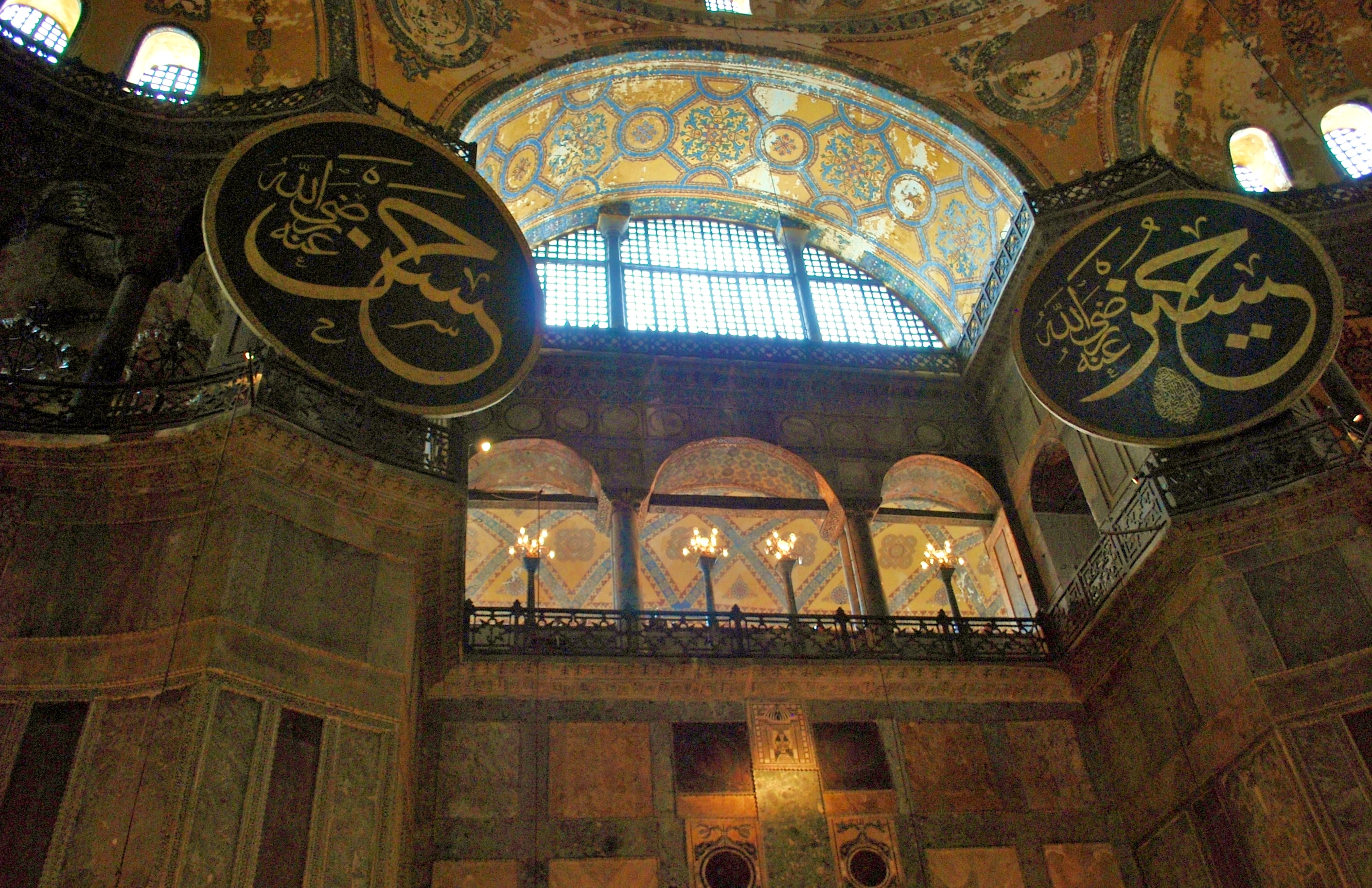 Исламские элементы